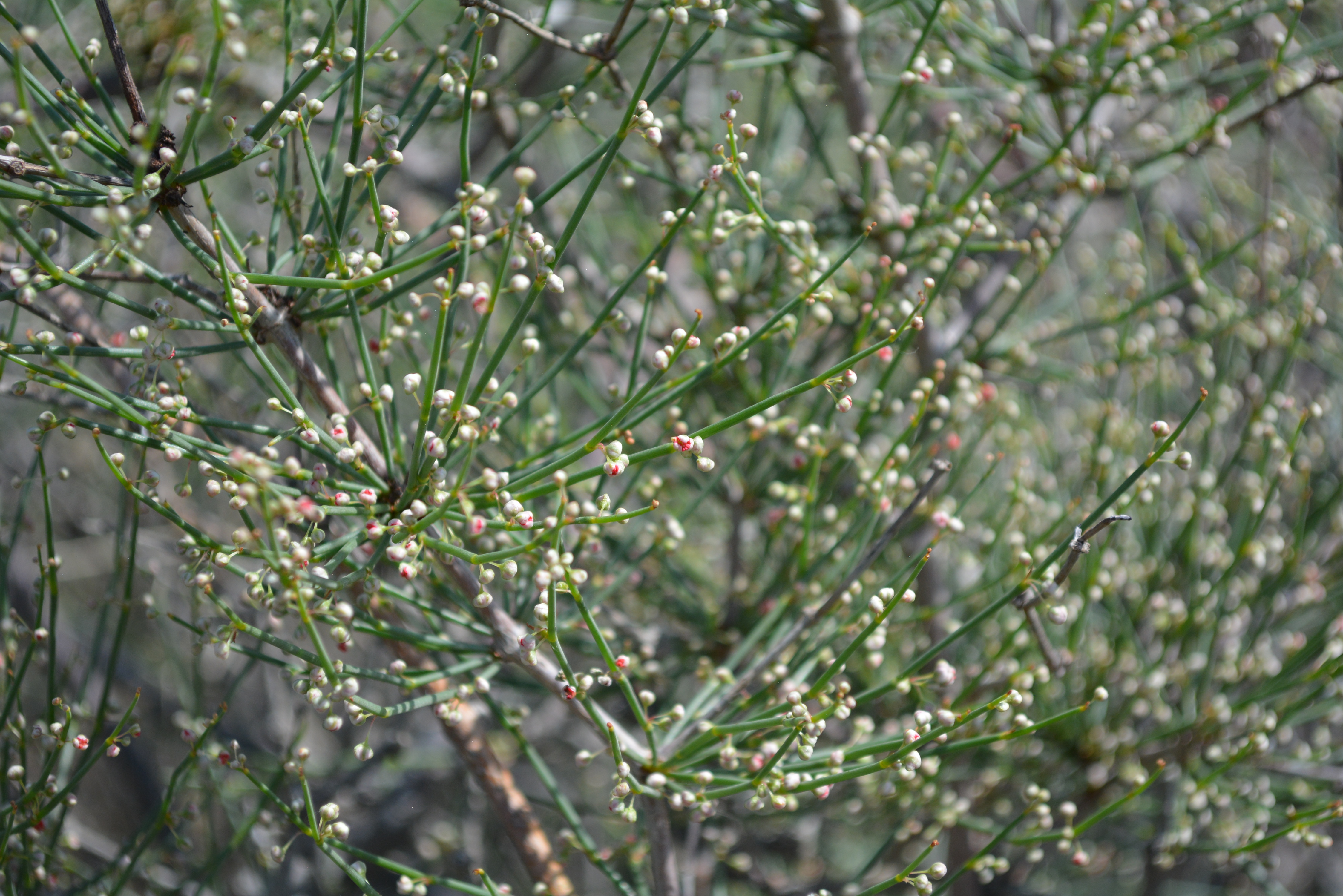 Գոռավանի ավազուտներ